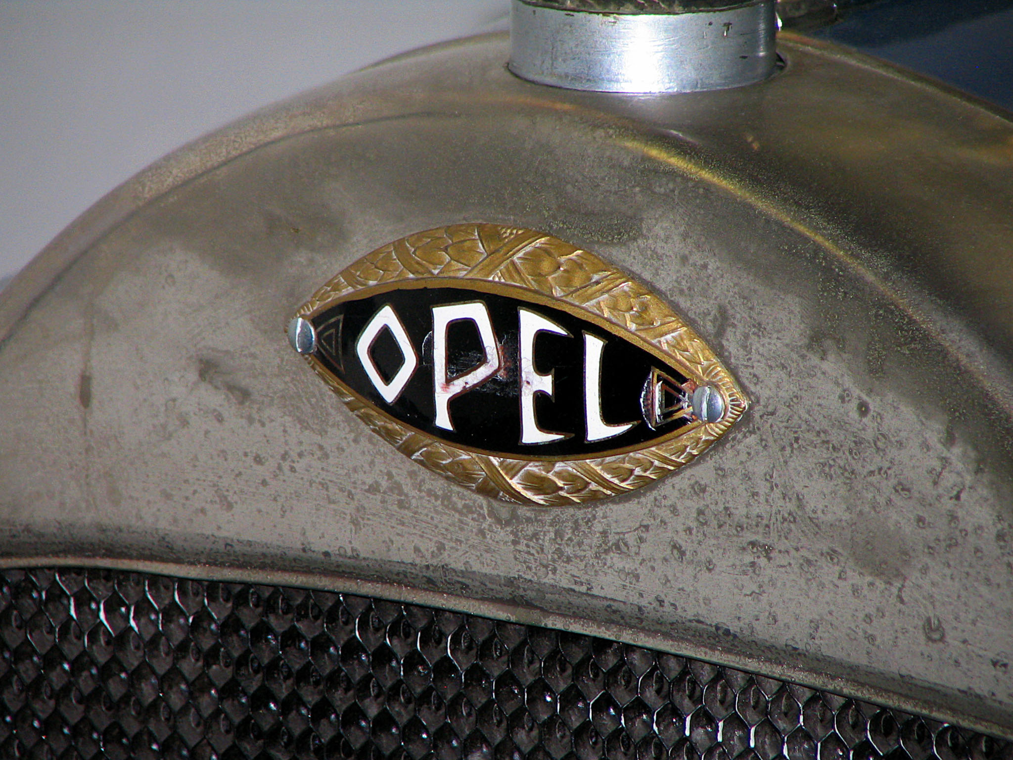 Hood ornament Opel 4/20 1929-1931 Kühlerfigur Opel 4/20 1929-1931